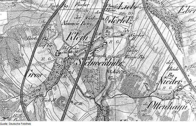 Original image description from the Deutsche Fotothek Großschweidnitz-Kleinschweidnitz. Oberreit, Sect. Zittau, 1844/46